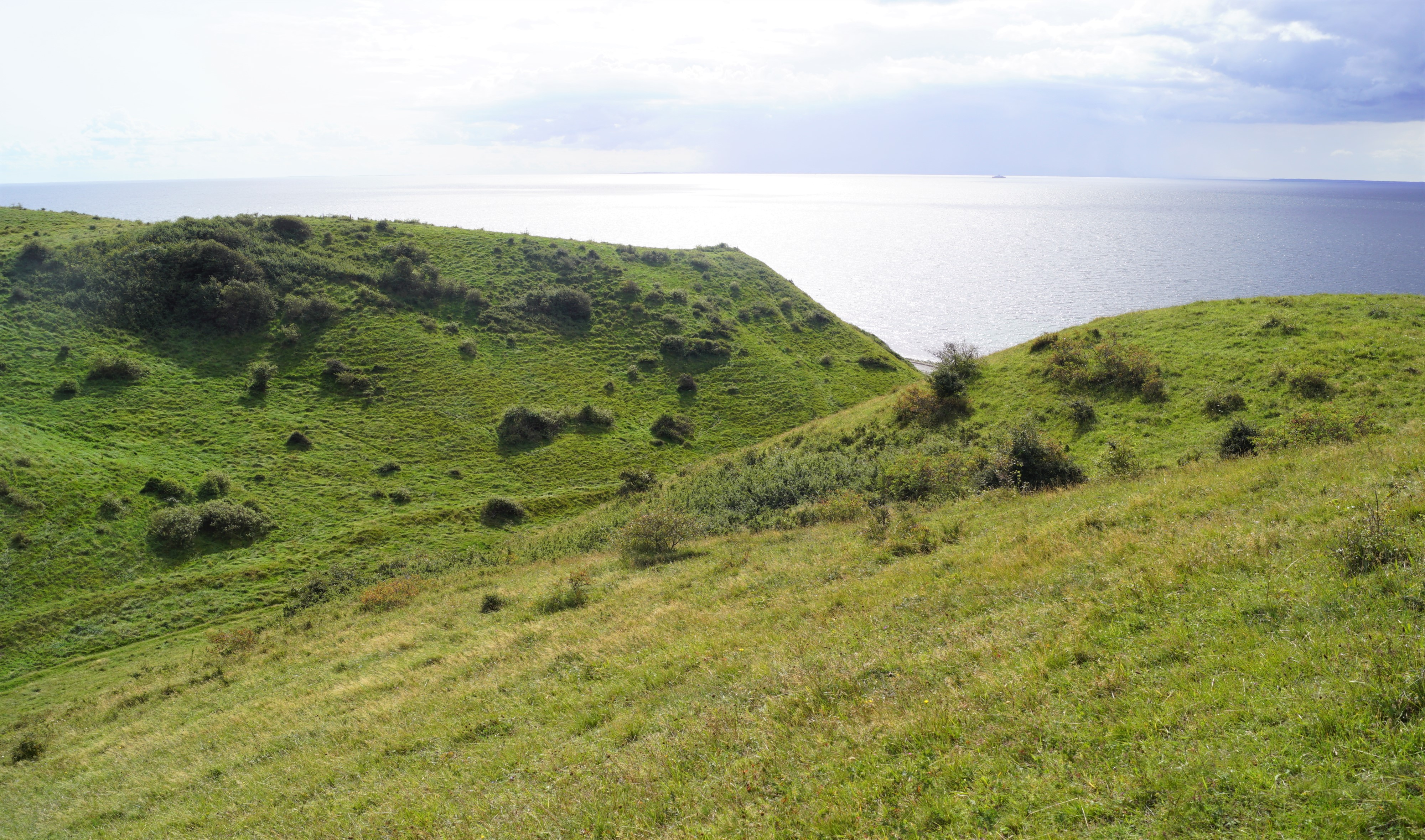 Møgelskår i Nordby Bakker, Samsø